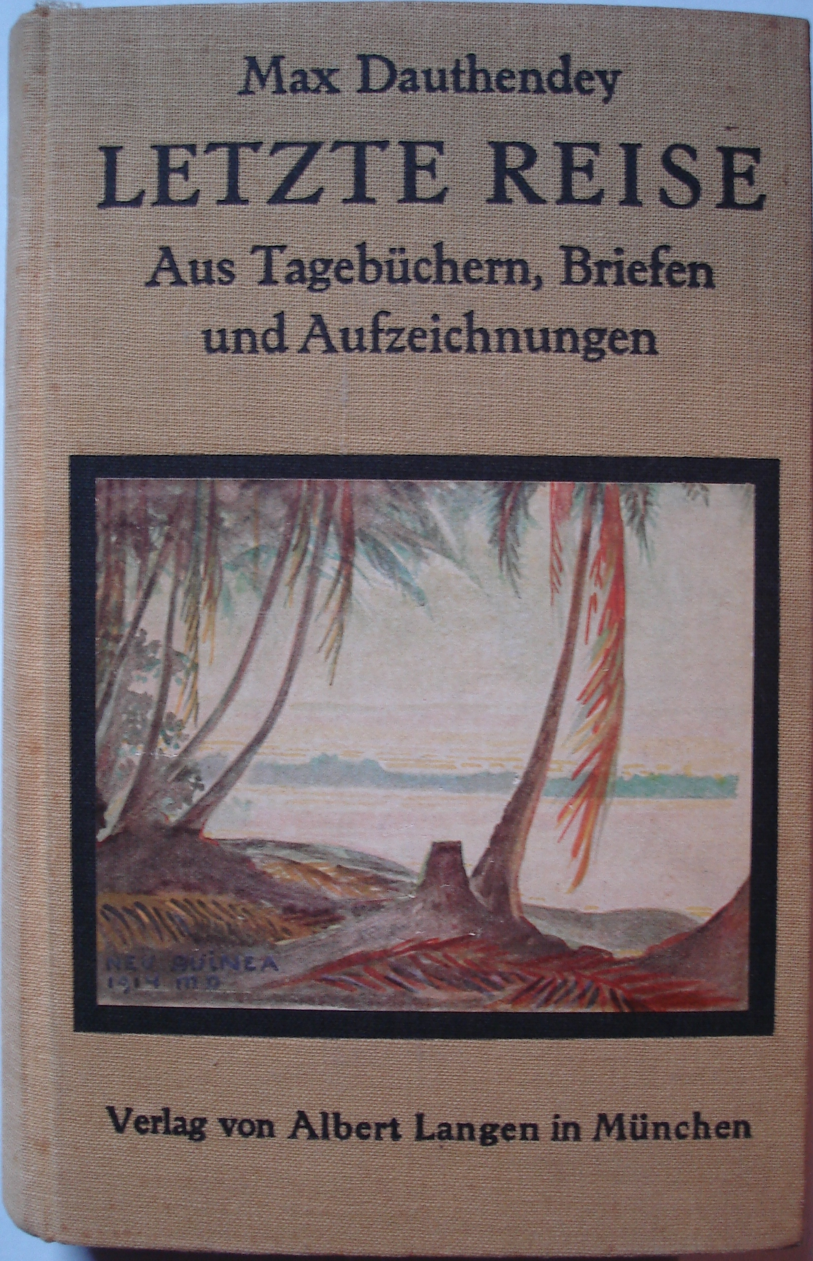 Titel von Dauthendeys letztem Werk